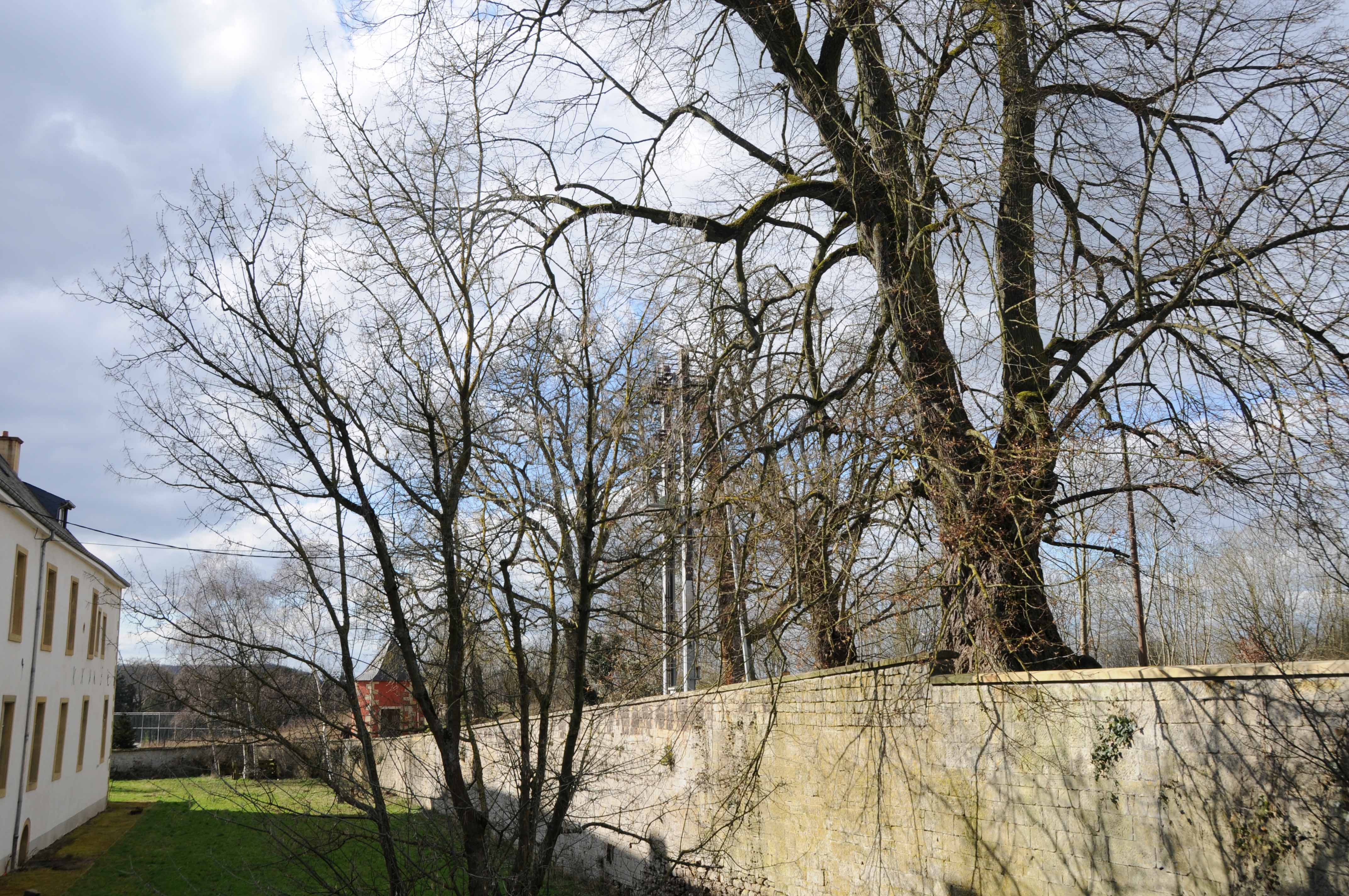 Lann zu Suessem. Suessem + Kategorie:Gemeng Suessem